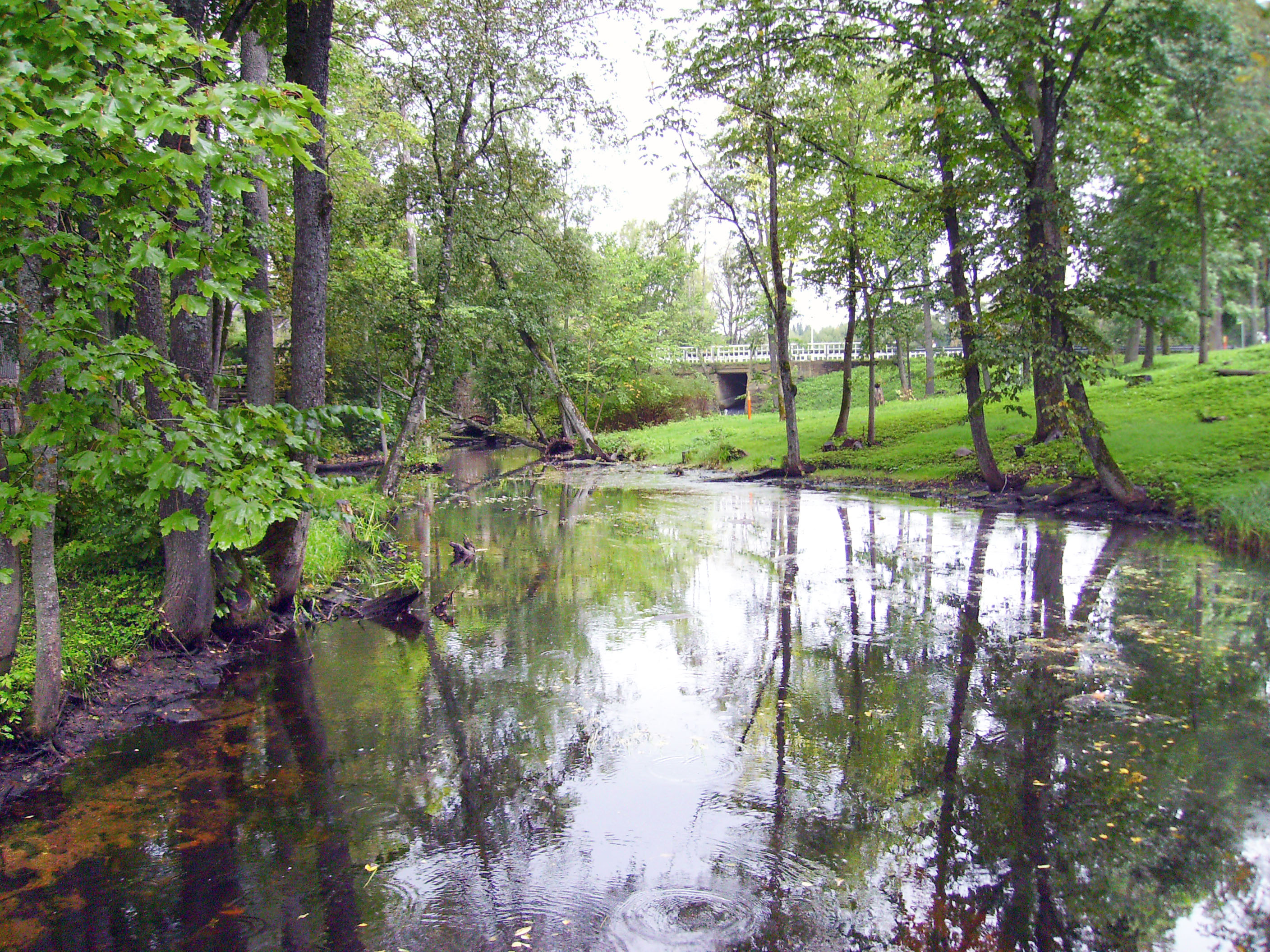 Amme jõgi Palamuses 4